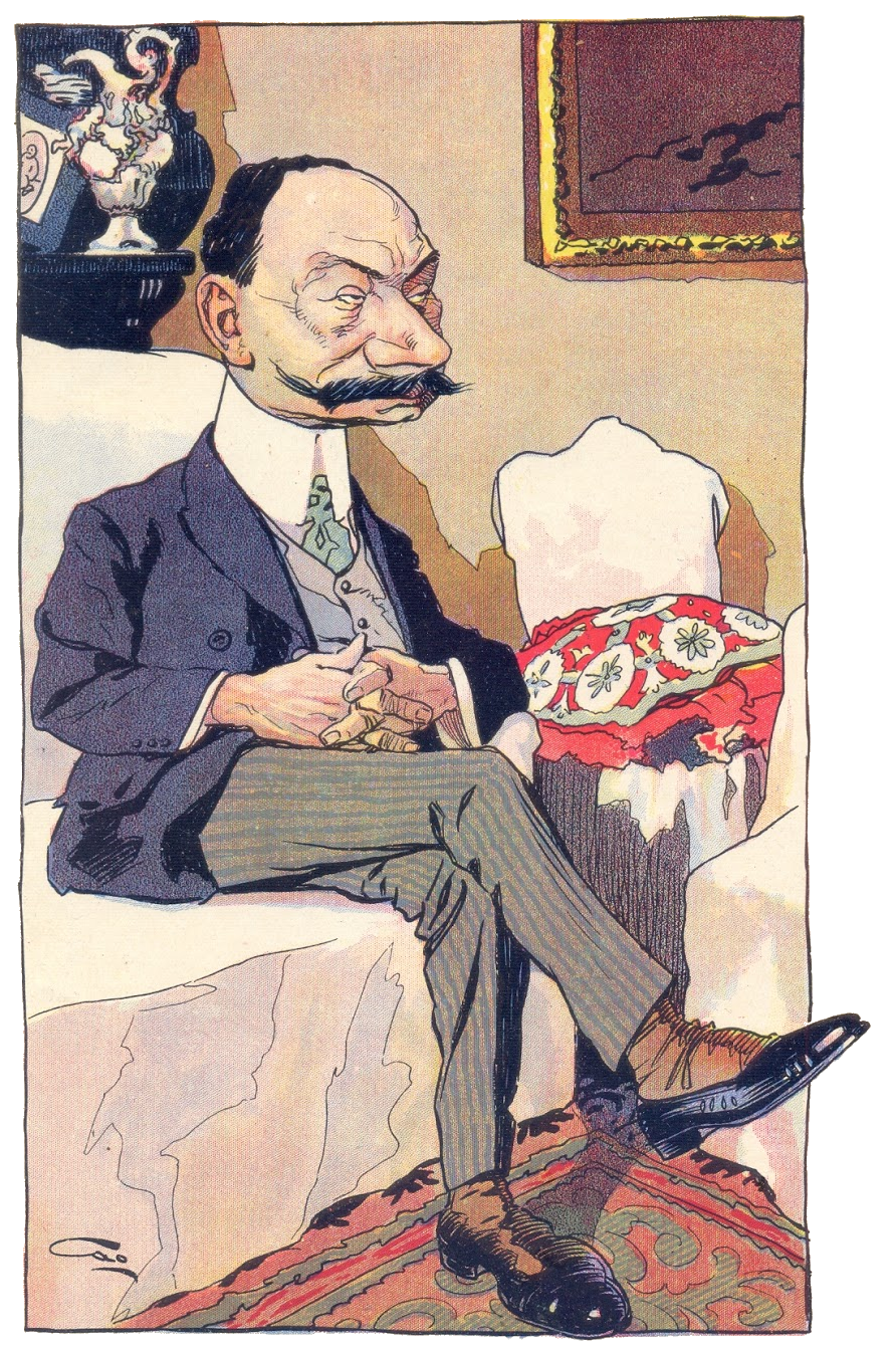 Como el hombre se ve en un apuro, pues sus muchos contrarios se juntan, —¿Estará —sus adictos preguntan— Galigniana Segura seguro?